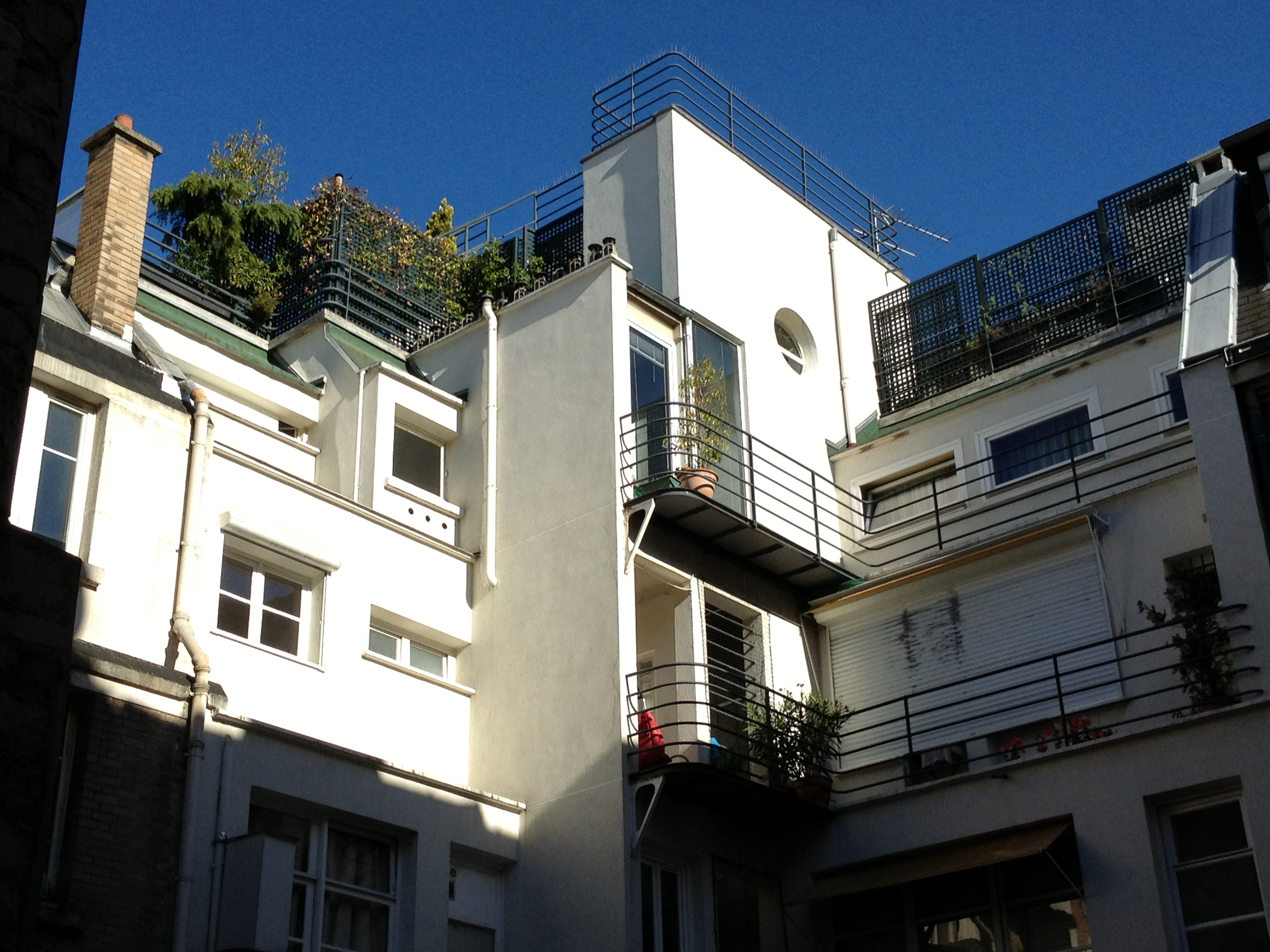 Façade côté cour du 25, avenue de Versailles à Paris (architectes associés: Jean Ginsberg & Berthold Lubetkin)